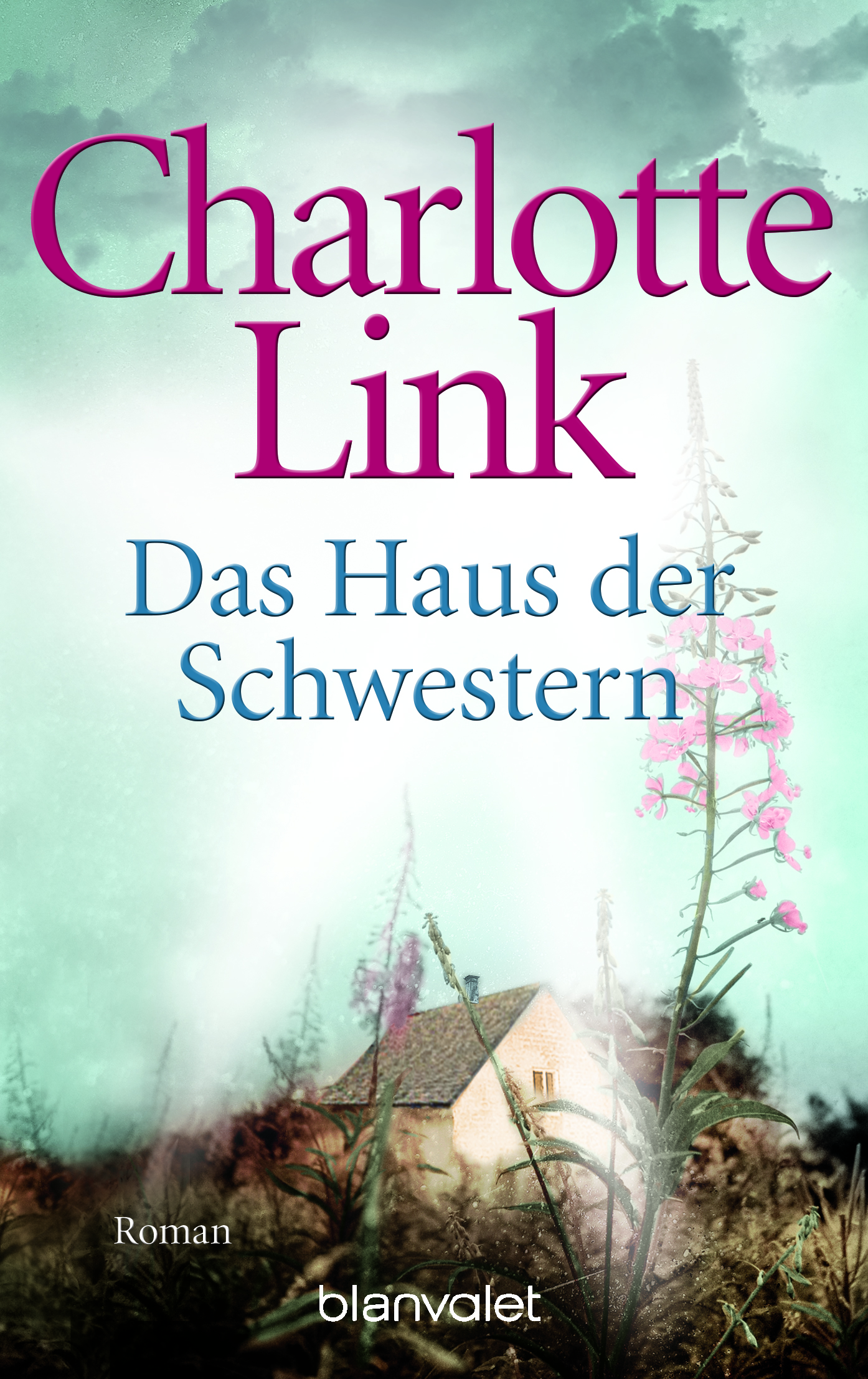 Charlotte Link: Das Haus der Schwestern. Blanvalet, München 2010. DNB